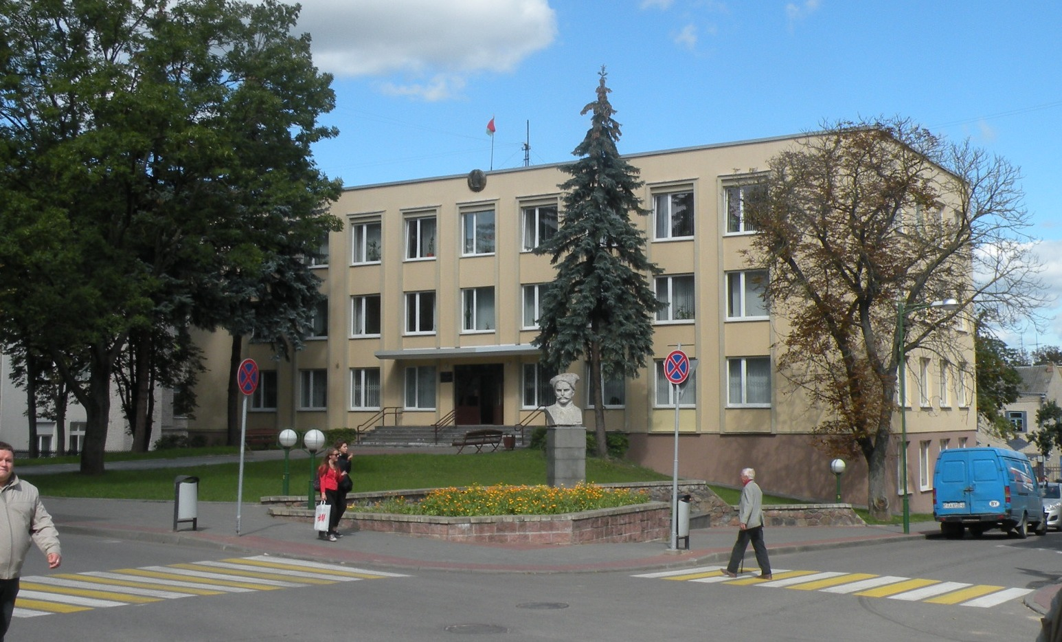 Здание гродненского областного суда (ул. Василька, 24, или ул. Кирова, 30) Перед зданием - памятник В.И. Чапаеву. Всё поле фотографии попадает в описанную в Государственном списке историко-культурных ценностей Республики Беларусь площадь Исторического центра Гродно (номер 411Е000002). This is a photo of Belarusian heritage monument. Reference number: 411Е000002 ( WLM)